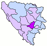 BosniaCanton Sarajevo